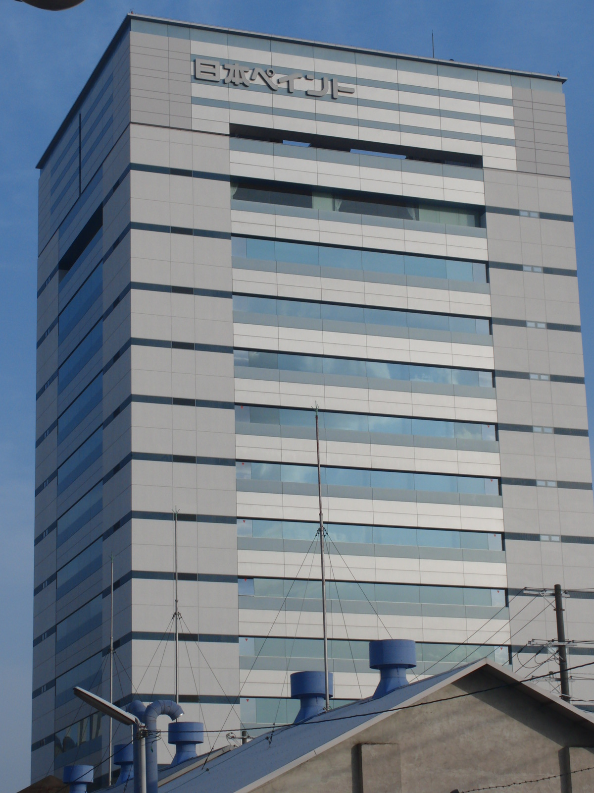 日本ペイントの本社を撮影。